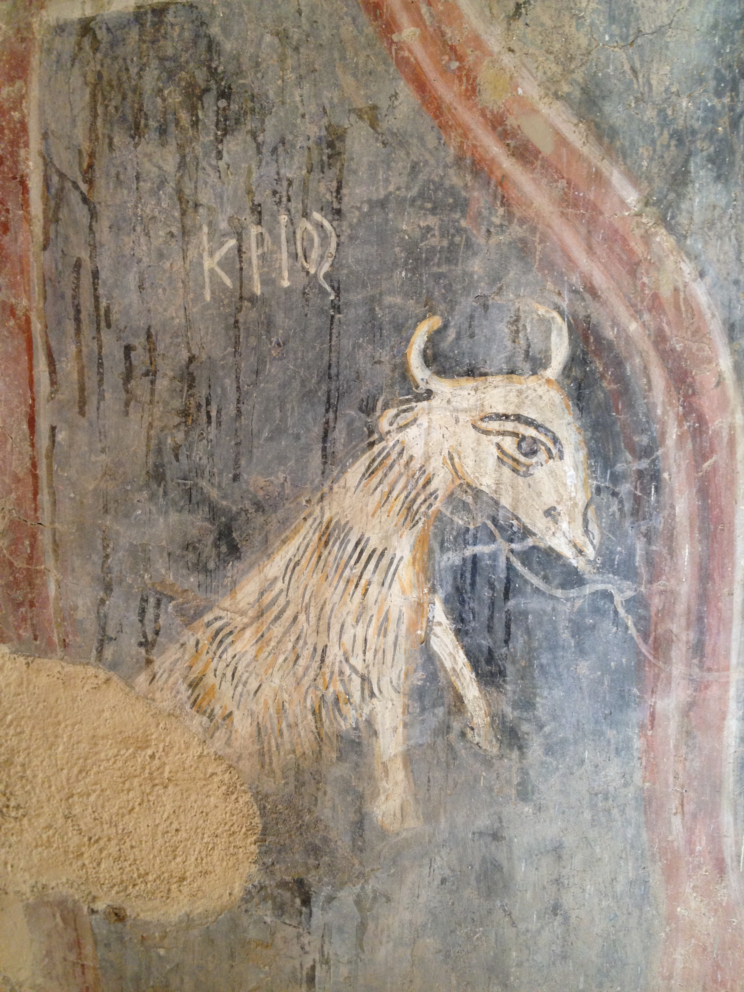 Affresco della controfacciata della chiesa di San Filadelfo - Badia di Santa Maria di Pattano (Vallo della Lucania).